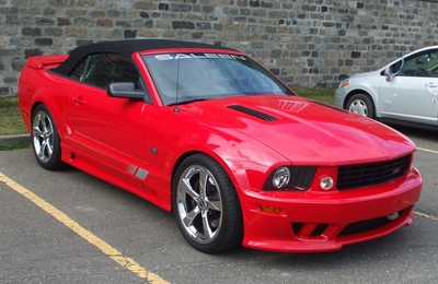 Français cadien: Photo prise à Ste-Luce près de Rimouski. Propriètaire S.Dubé de Rimouski. Au Canada seulement 30 modèles ont été transformés en 2007 à partir de Mustang GT.